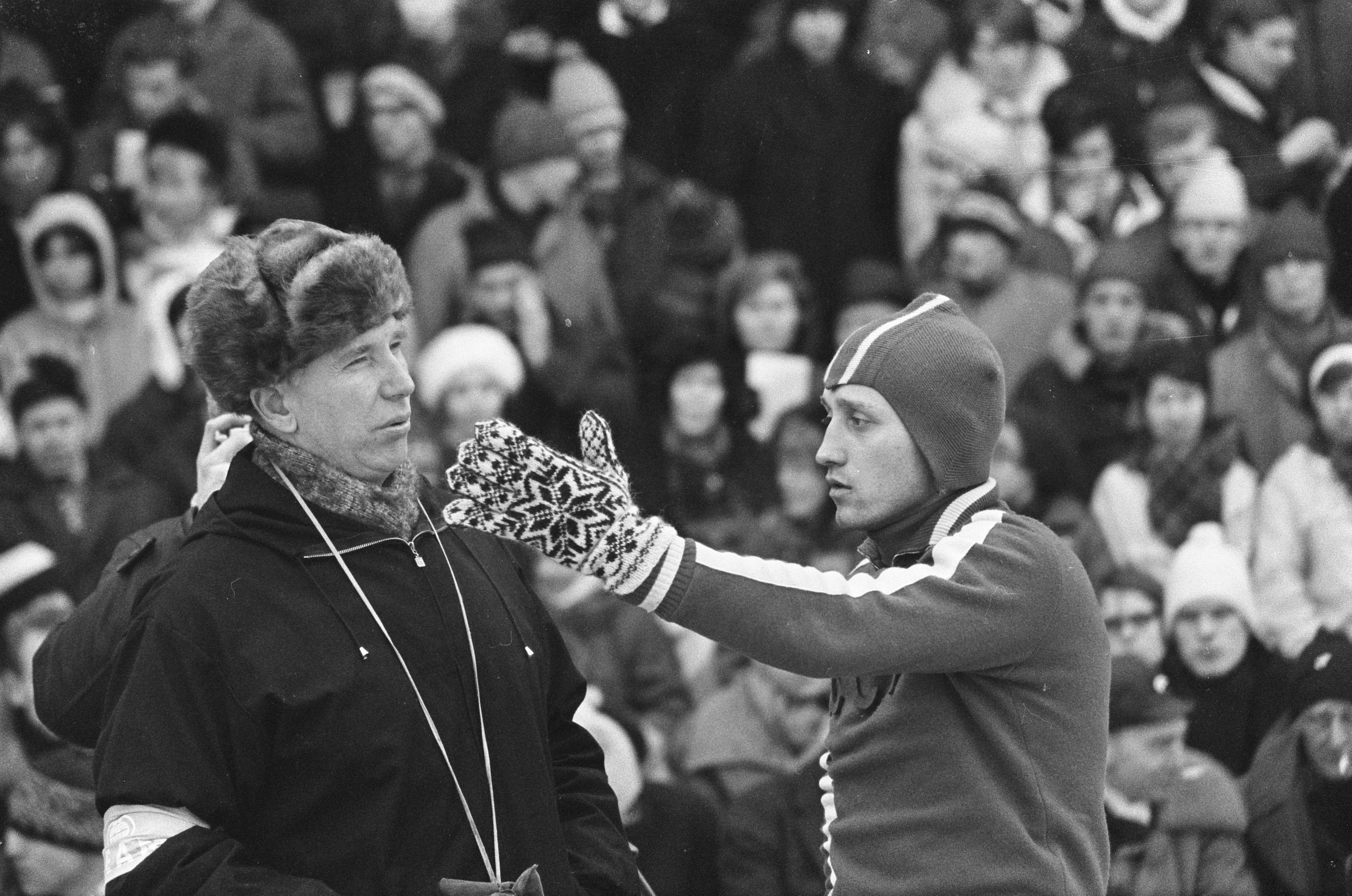 Collectie / Archief : Fotocollectie Anefo Reportage / Serie : [ onbekend ] Beschrijving : De russische schaatser Kaplan met zijn trainer Stenin Datum : 20 februari 1967 Trefwoorden : schaatsen, sport, trainers Persoonsnaam : Kaplan, Valery, Stenin, Boris Fotograaf : Kroon, Ron / Anefo, [onbekend] Auteursrechthebbende : Nationaal Archief Materiaalsoort : Negatief (zwart/wit) Nummer archiefinventaris : bekijk toegang 2.24.01.05 Bestanddeelnummer : 920-0946 Reacties Geplaatst door Dirk Broer op 07 oktober 2013 - 21:15. De man links is NIET Boris Stenin, maar Konstantin Koedrjavtsev